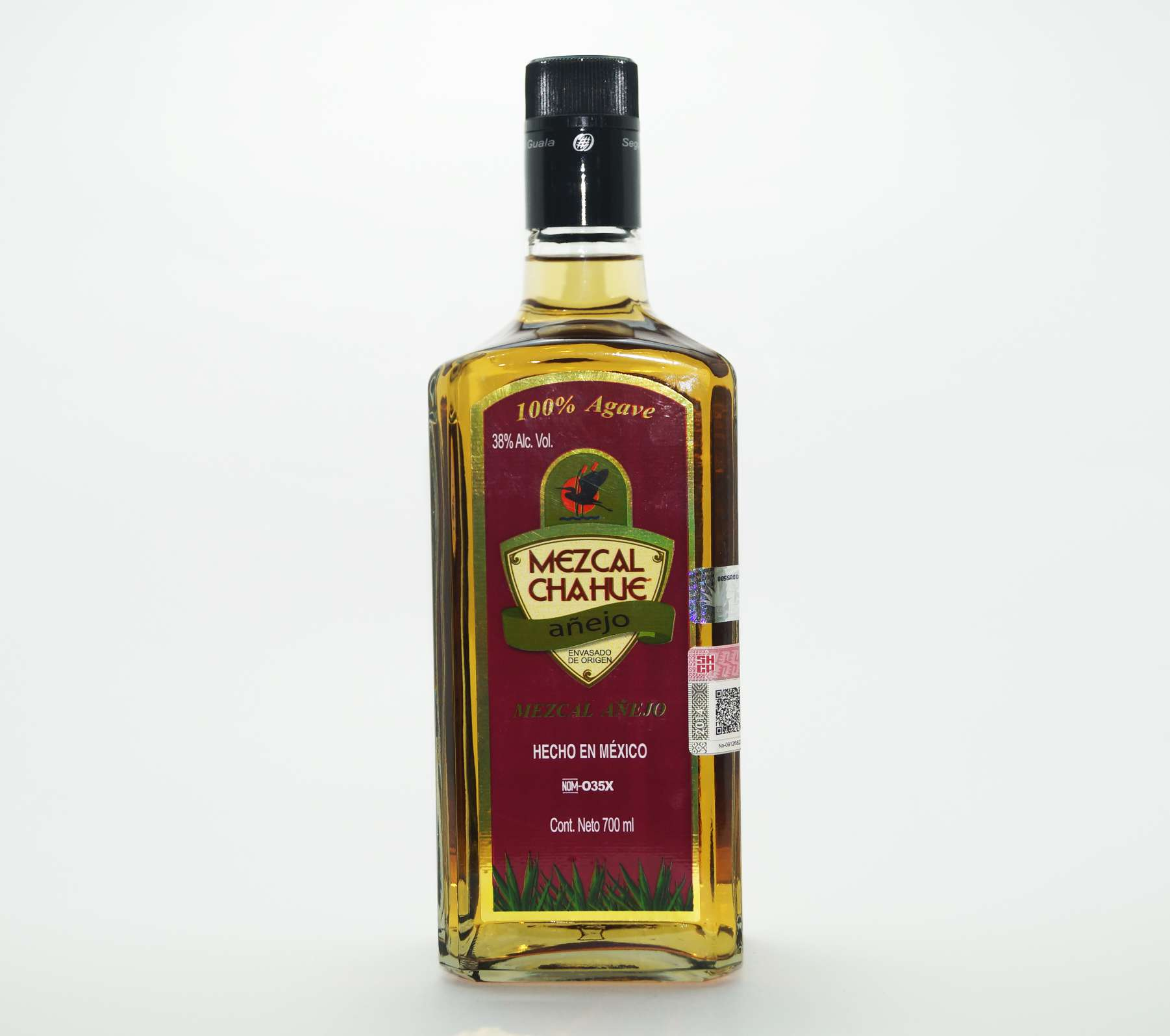 Mezcal añejado 1 año en barrica de roble blanco, certificado ante el Consejo Regulador del Mezcal.